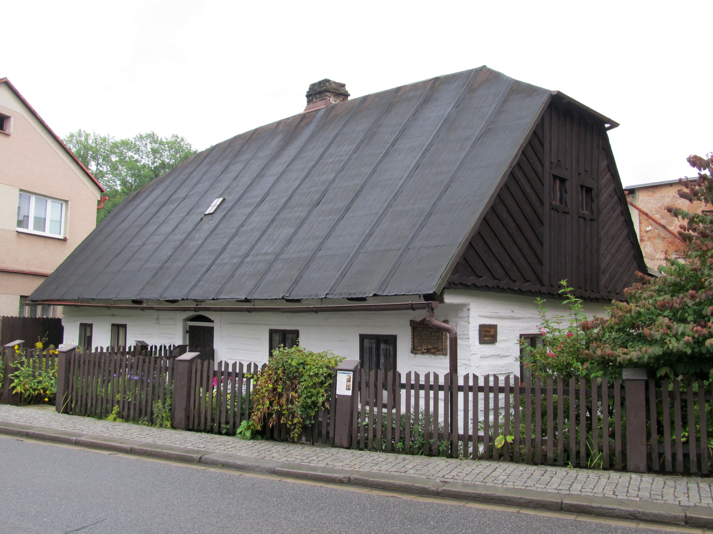 Venkovský dům - Kalinův domek (Hronov), Jiráskova 73, Hronov